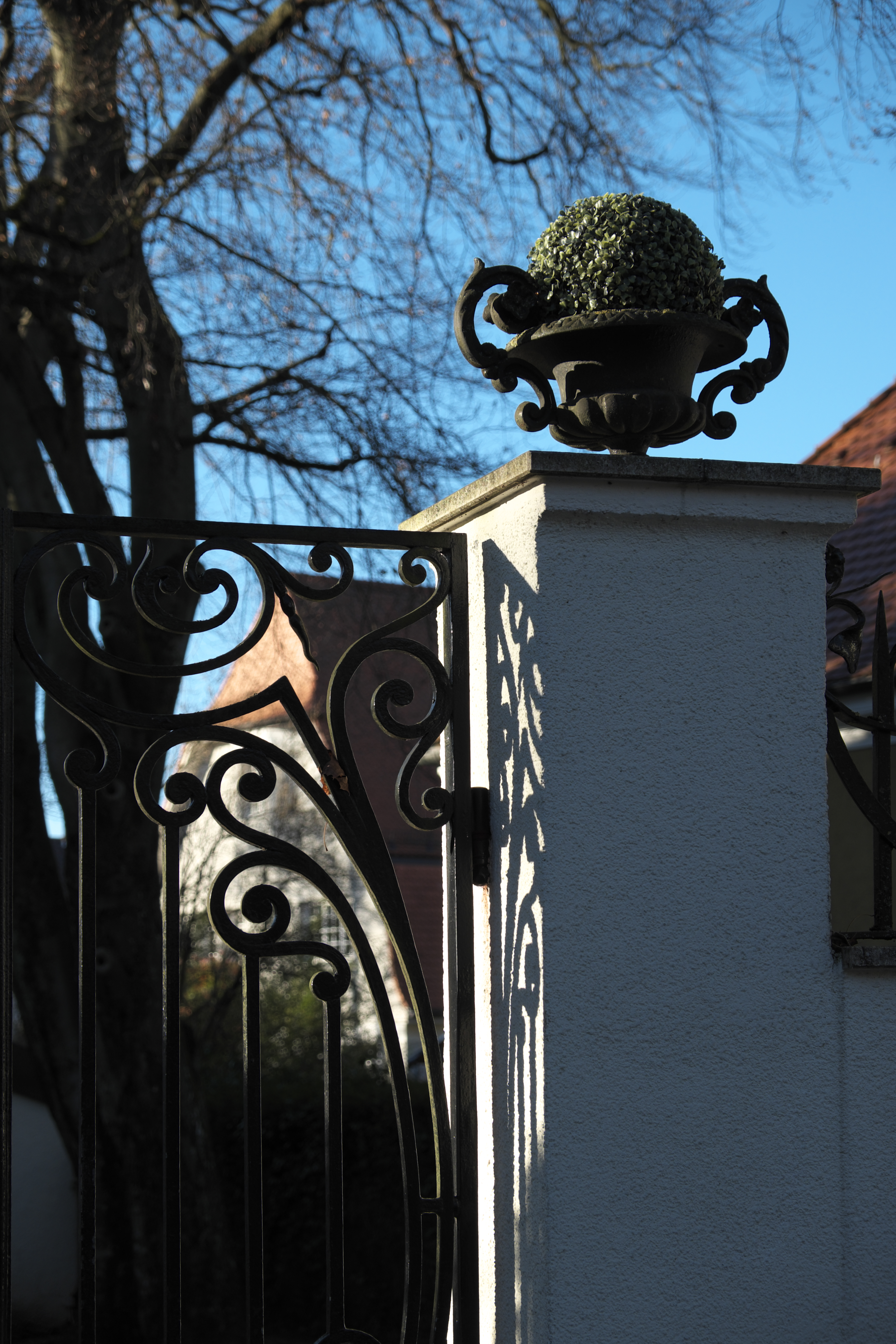 Landhaus in der Grandlstraße 68 in Obermenzing im Stadtbezirk Pasing-Obermenzing in München (Bayern/Deutschland), 1895/1900 erbaut, Gartentor